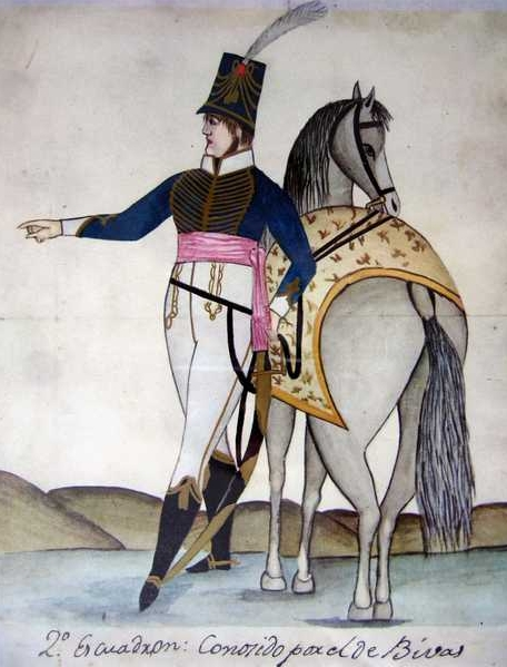 Uniforme de oficial del escuadrón de Húsares de Vivas